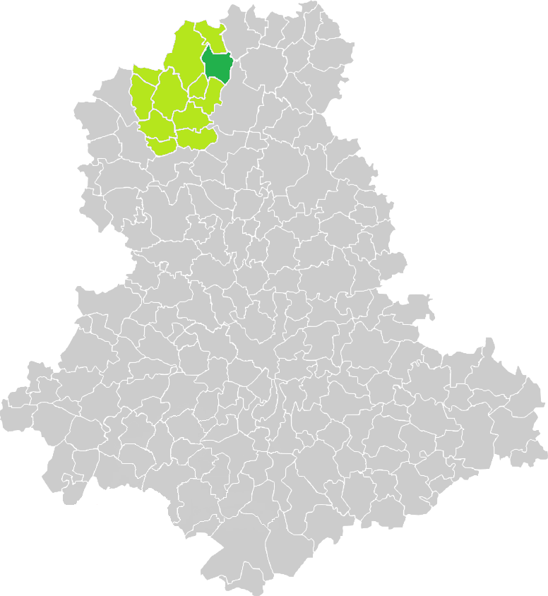 Carte de situation de la commune de Tersannes (en vert foncé) dans le votre Canton (en vert clair) sur une carte des communes de la Haute-Vienne